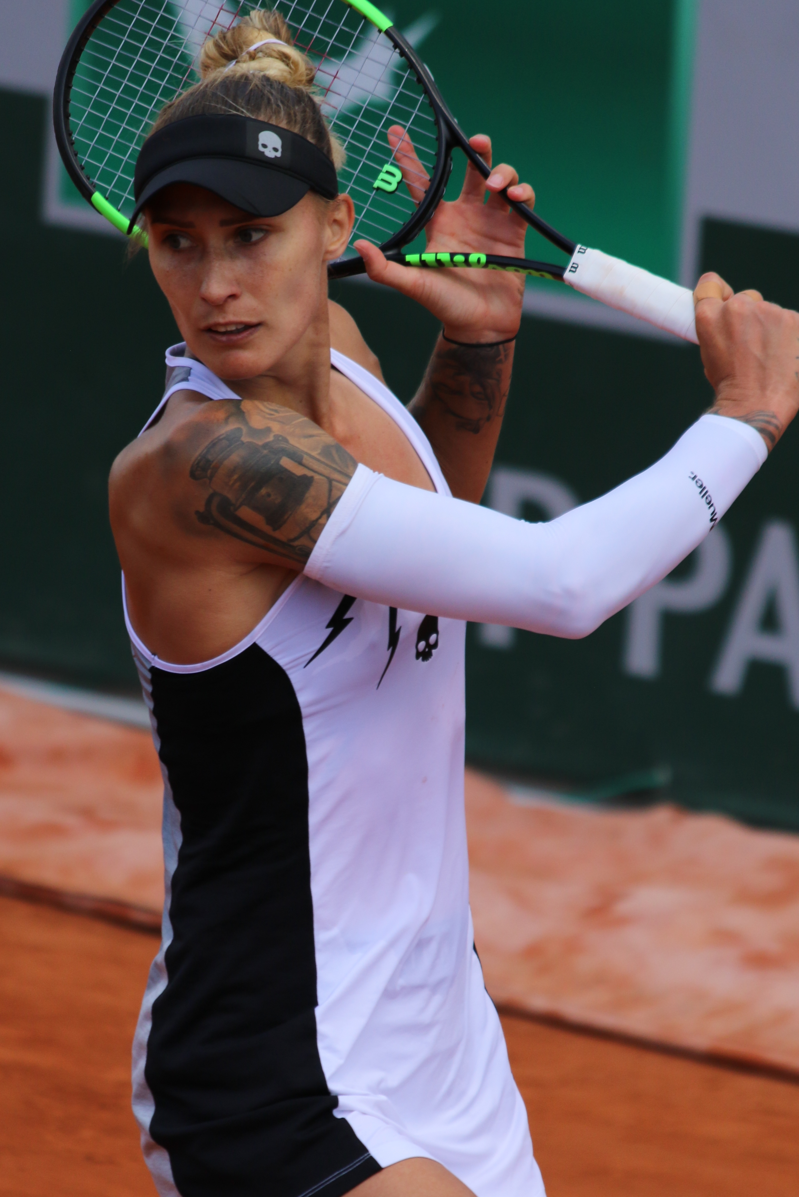 Hercog RG19 (70)